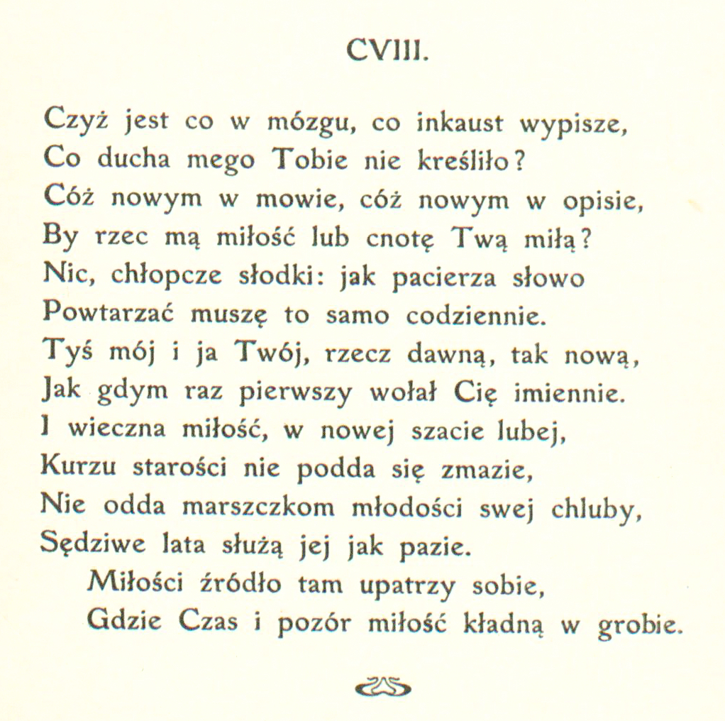 Sonety Shakespeare'a I-CXXXIV i CXXXVII-CLIV tłumaczenie Maria Sułkowska (MUS) sonet 108 (strona 122)